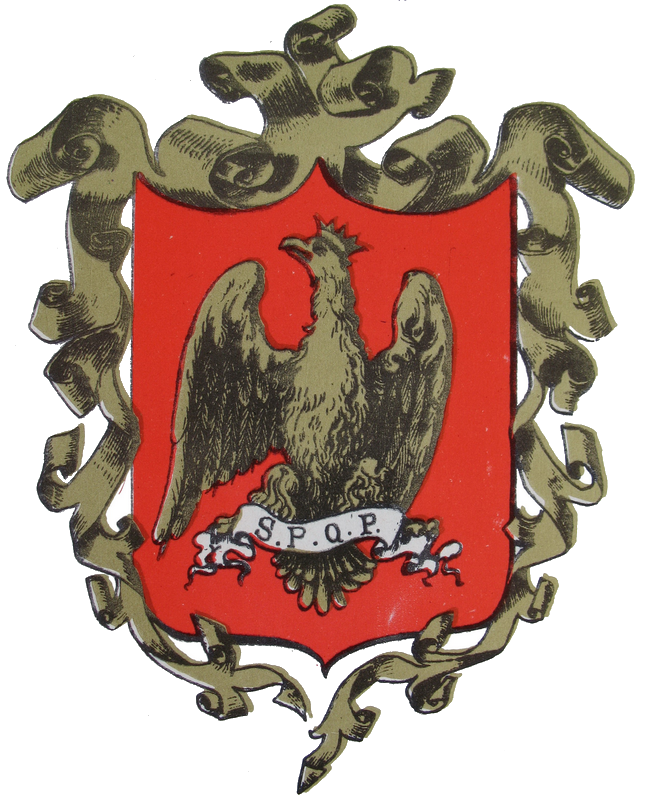 Stemma della città di Palermo, dalla tavola 86 de Il blasone in Sicilia, (1871-75).